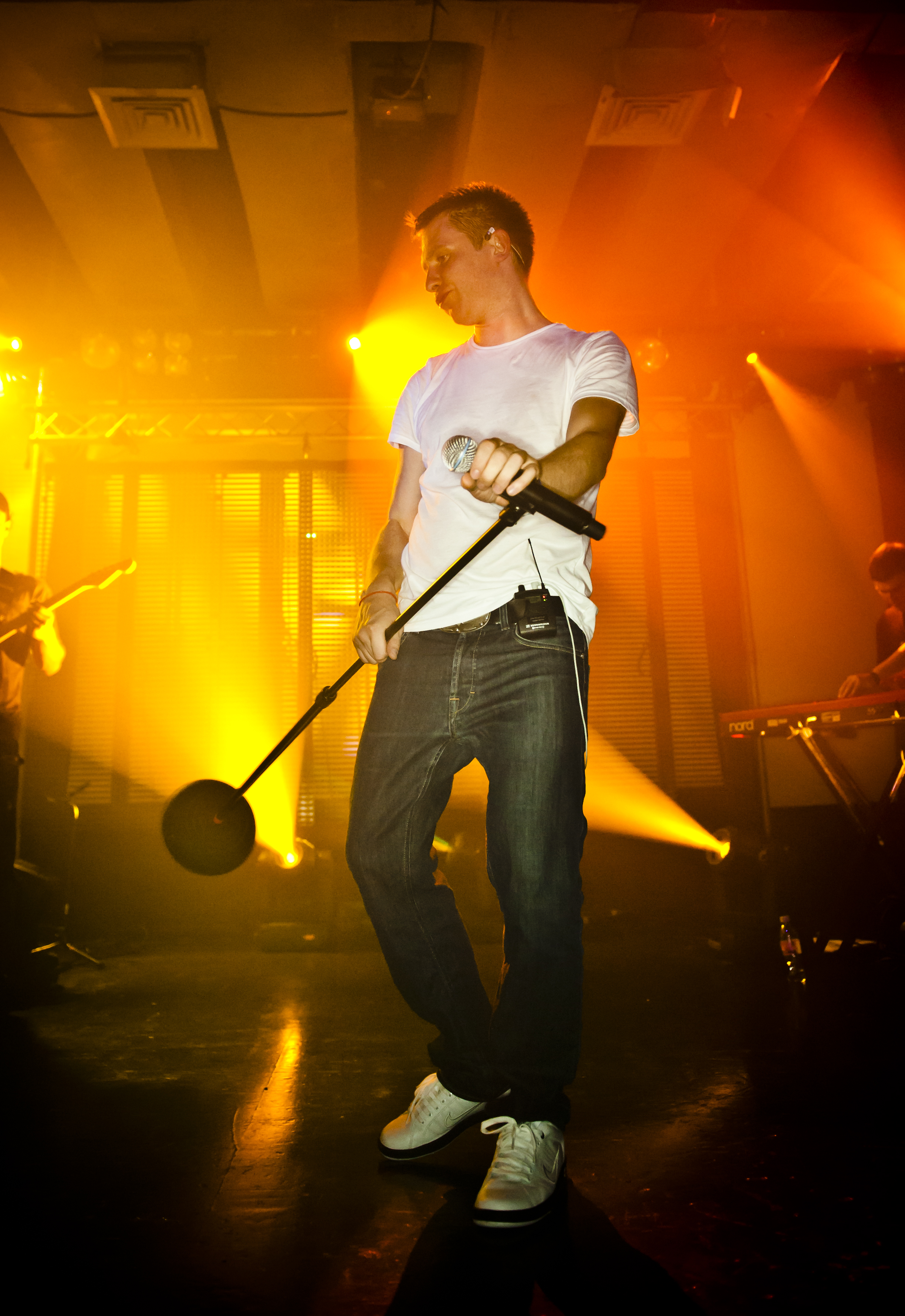 SEL. Egidijus Dragūnas